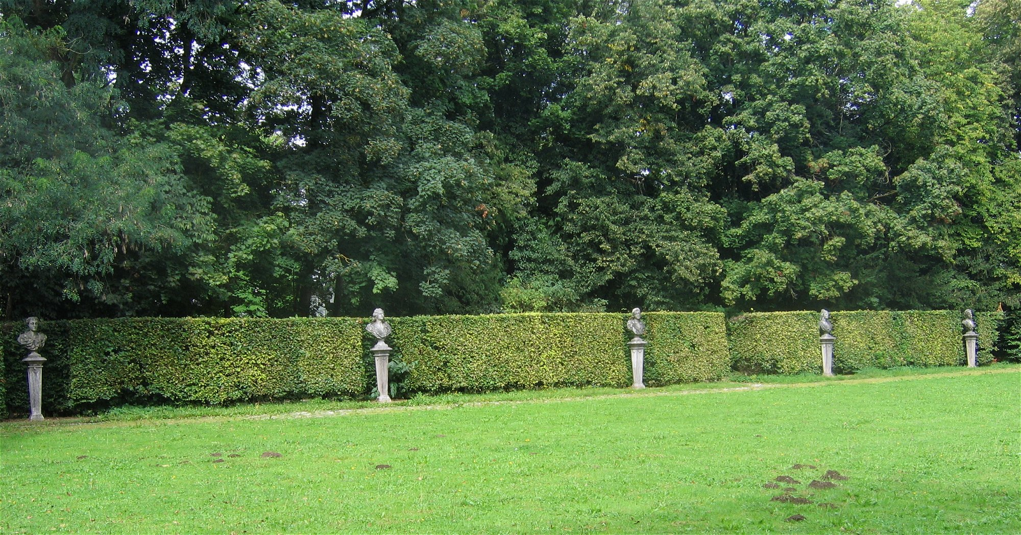 Schlosspark Nymphenburg, Nördlicher Kabinettsgarten